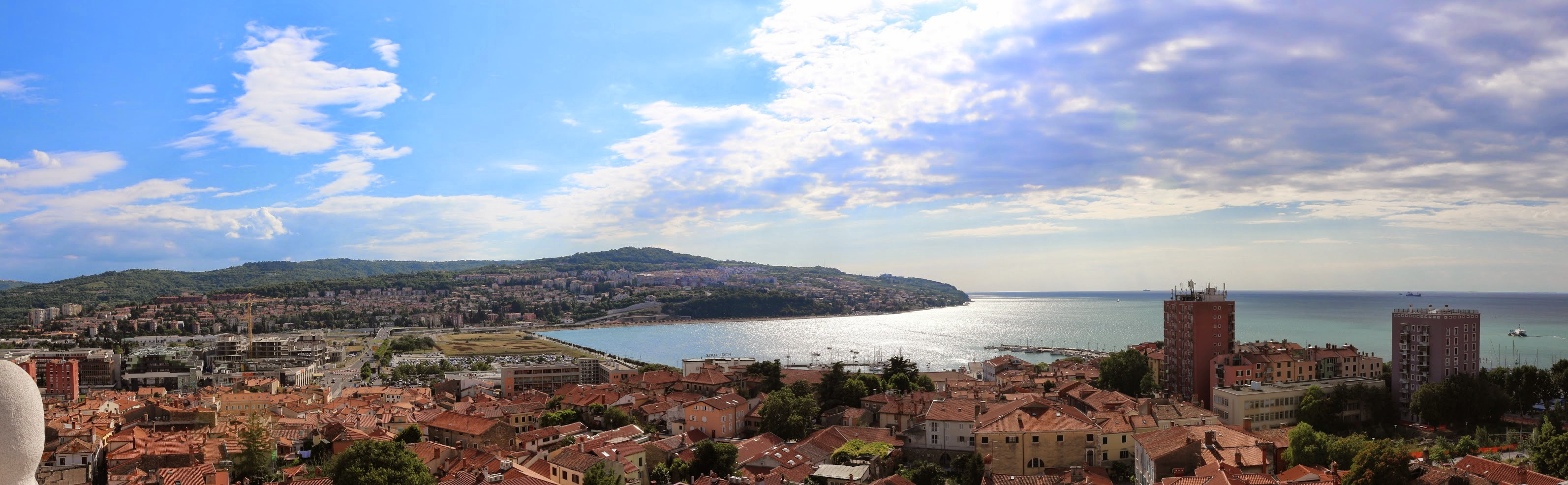 Koper